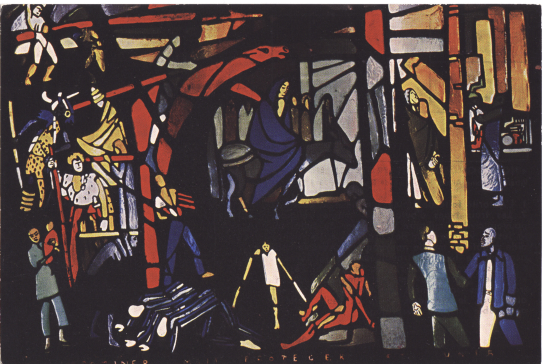 Vitrail pour l'Expo 58 à Bruxelles, aujourd'hui rue Guimard